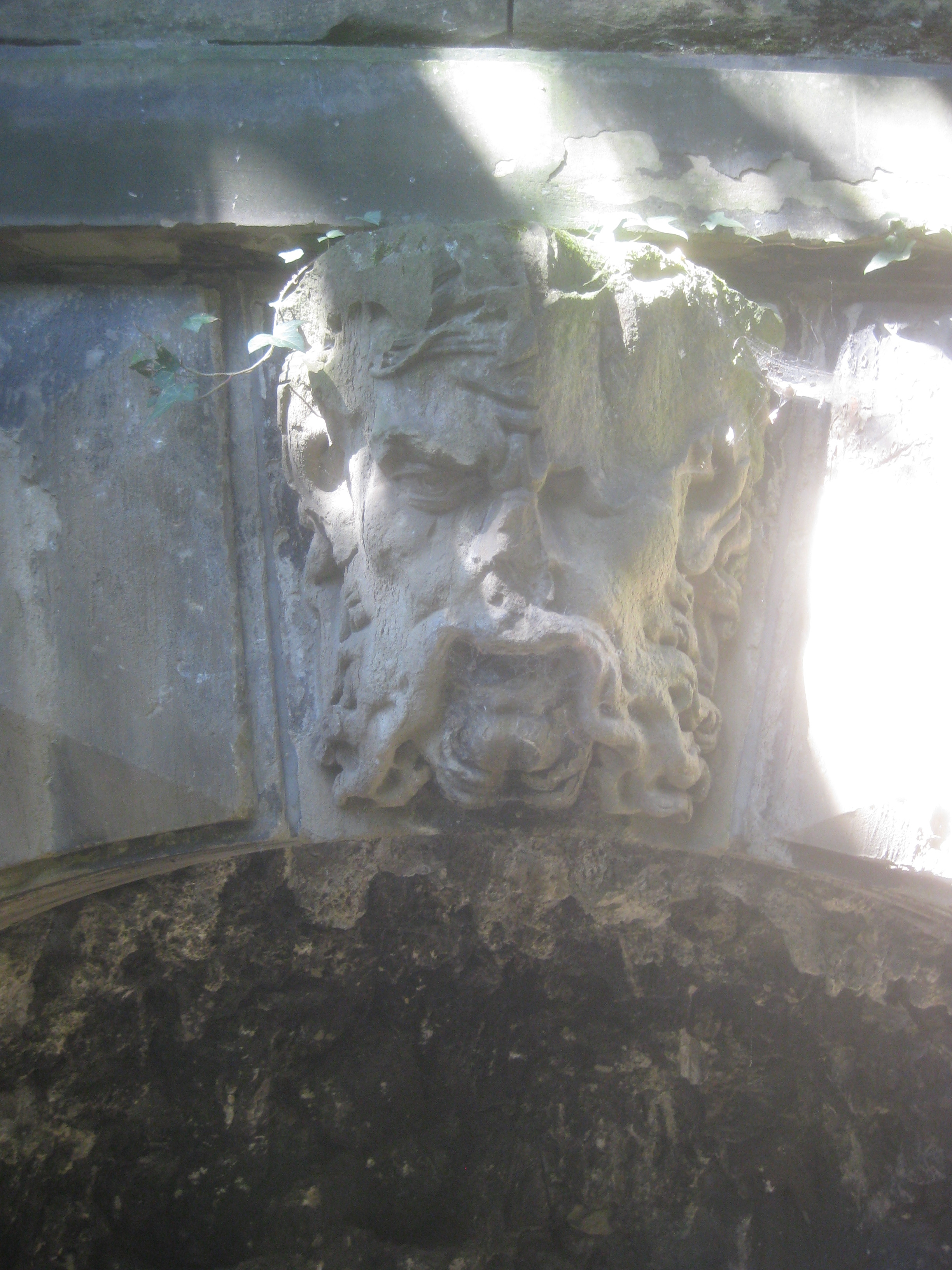 Fratzenkopf, Villa Moser, Stuttgart.